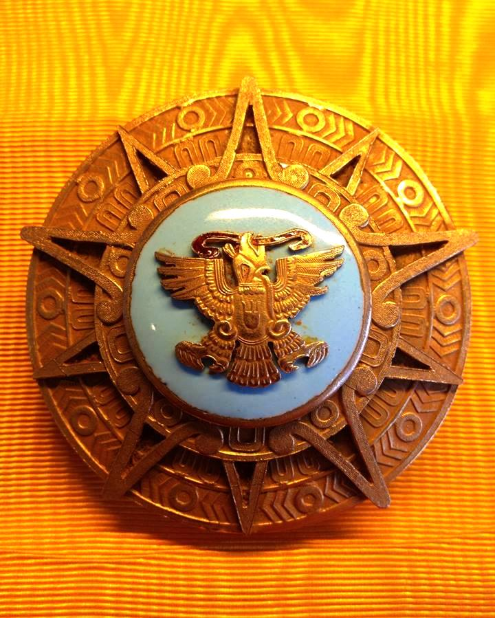 Placa y banda de la Orden del Águila Azteca, en mi colección particular.